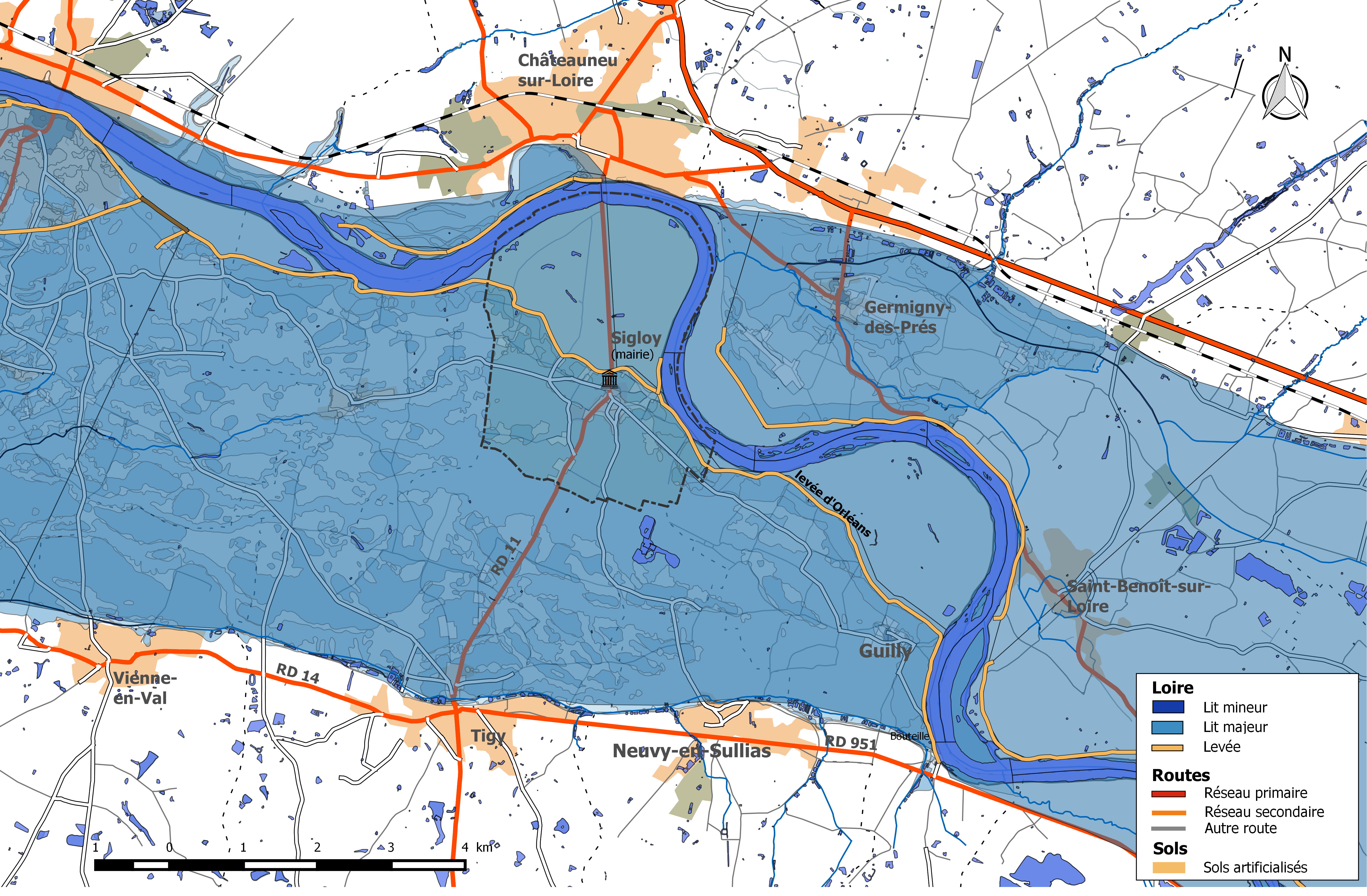 Zone inondable et réseaux hydrographique et routier de la commune de Sigloy.